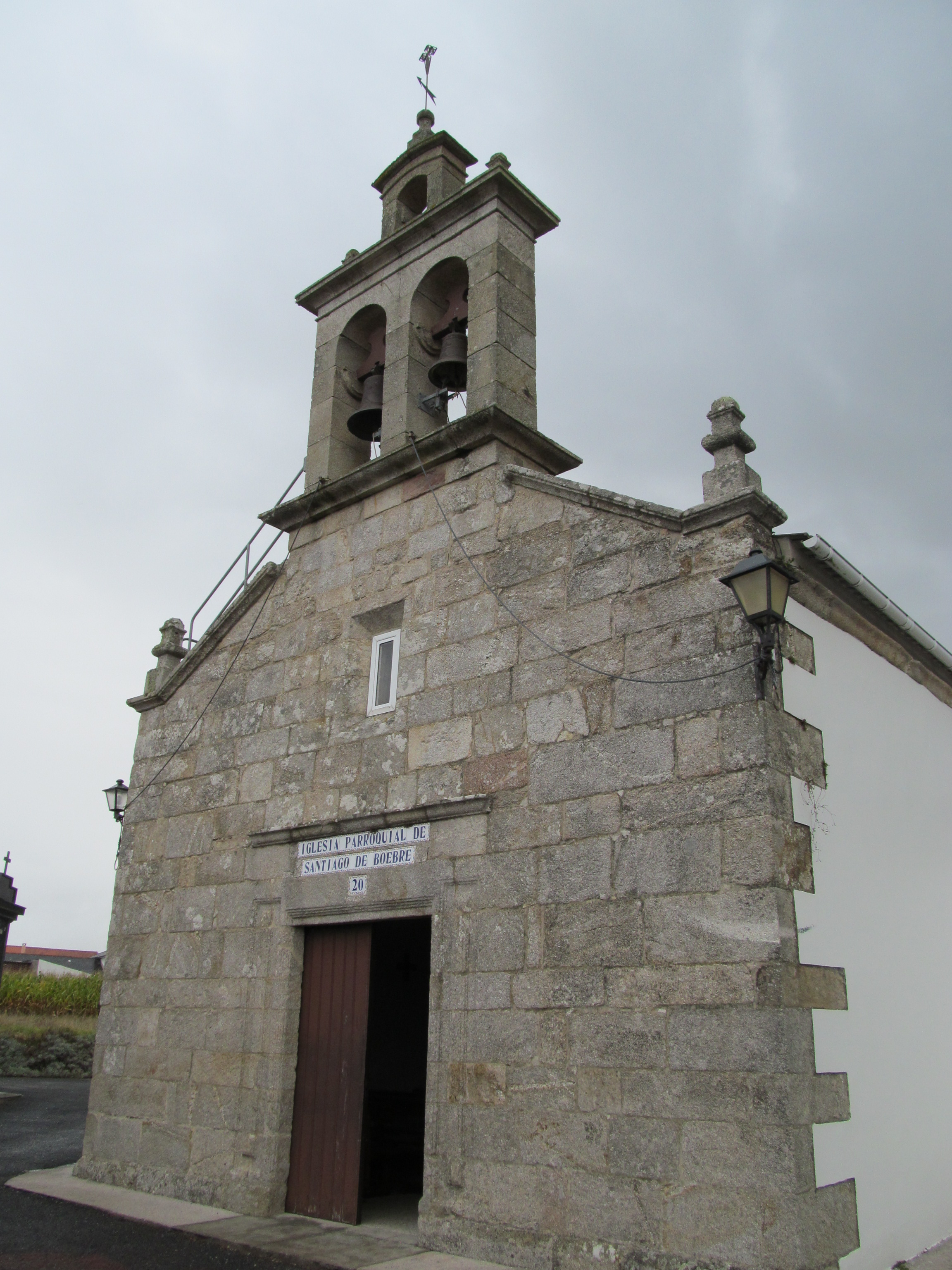 Iglesia parroquial de Santiago de Boebre, en Pontedeume, Galicia, España.